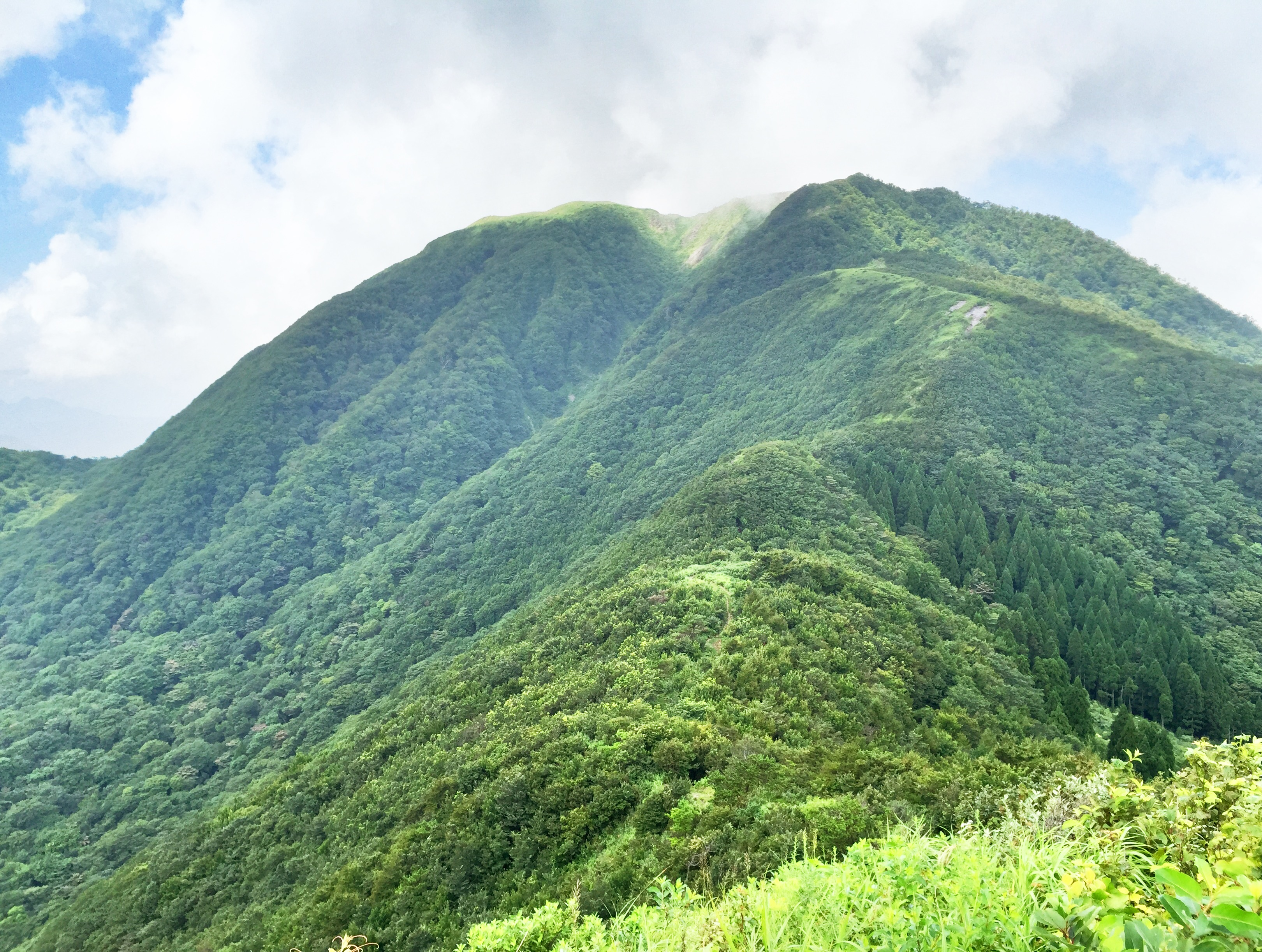 女三瓶山の山頂より男三瓶山を望む。稜線の上には、男三瓶山への登山道が見える。一部は花崗岩が露出しており、足場が悪い